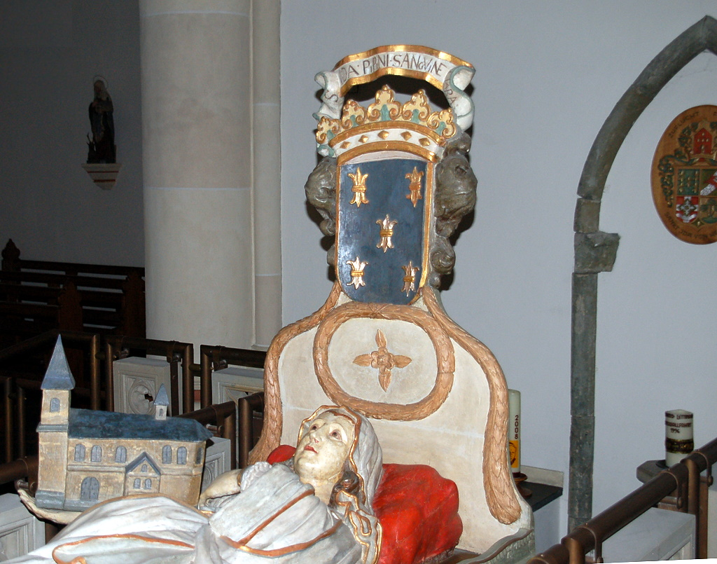 Denkmal der hl. Ida in der St. Idakirche in Herzfeld (Westf.)